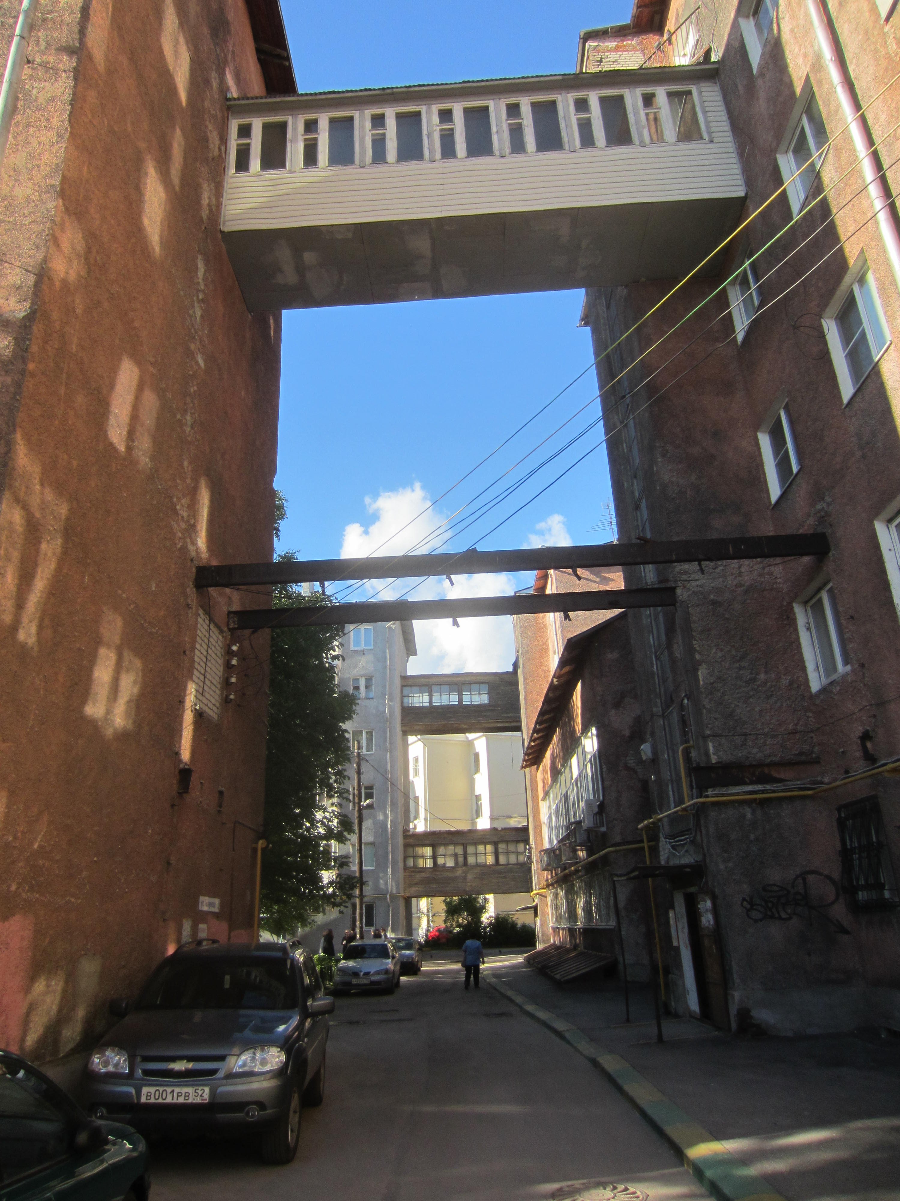 Дом-коммуна Культурная революция (Нижний Новгород)